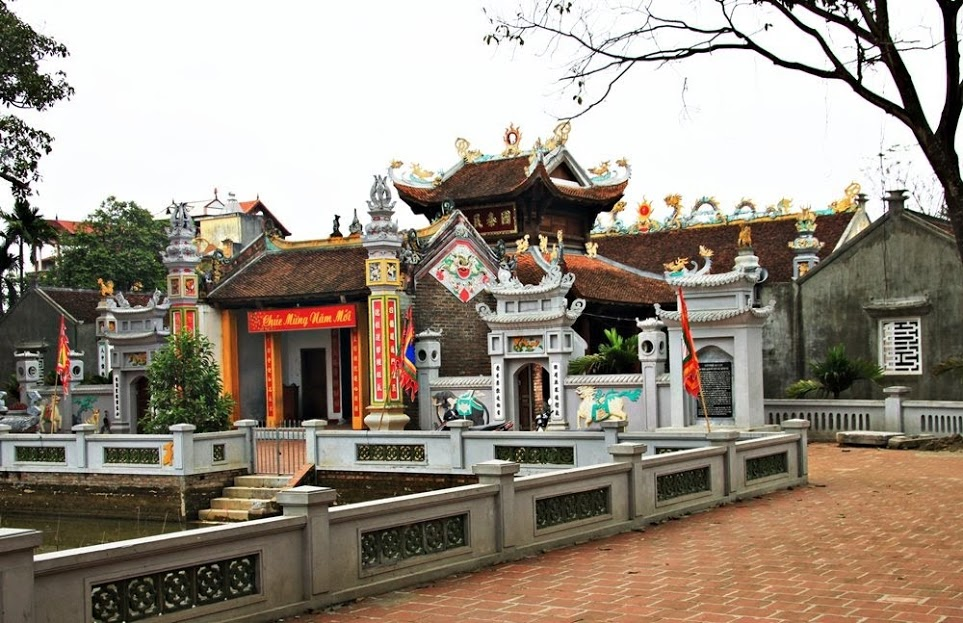 Đền Nội Bình Đà